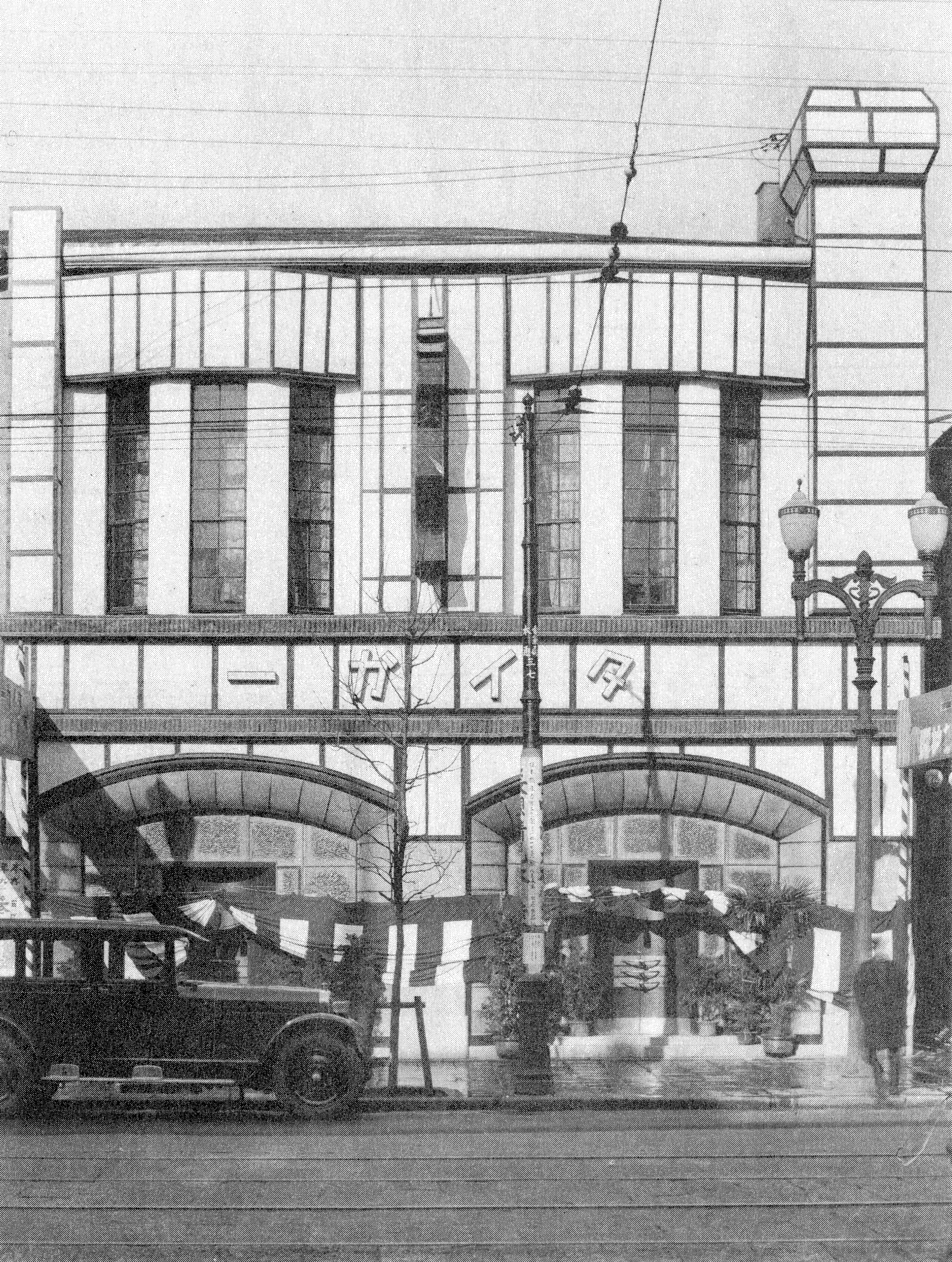 1924年に銀座にオープンしたカフェー・タイガー。写真は1930年に本郷バーに身売りされ改修されたあとの外観。